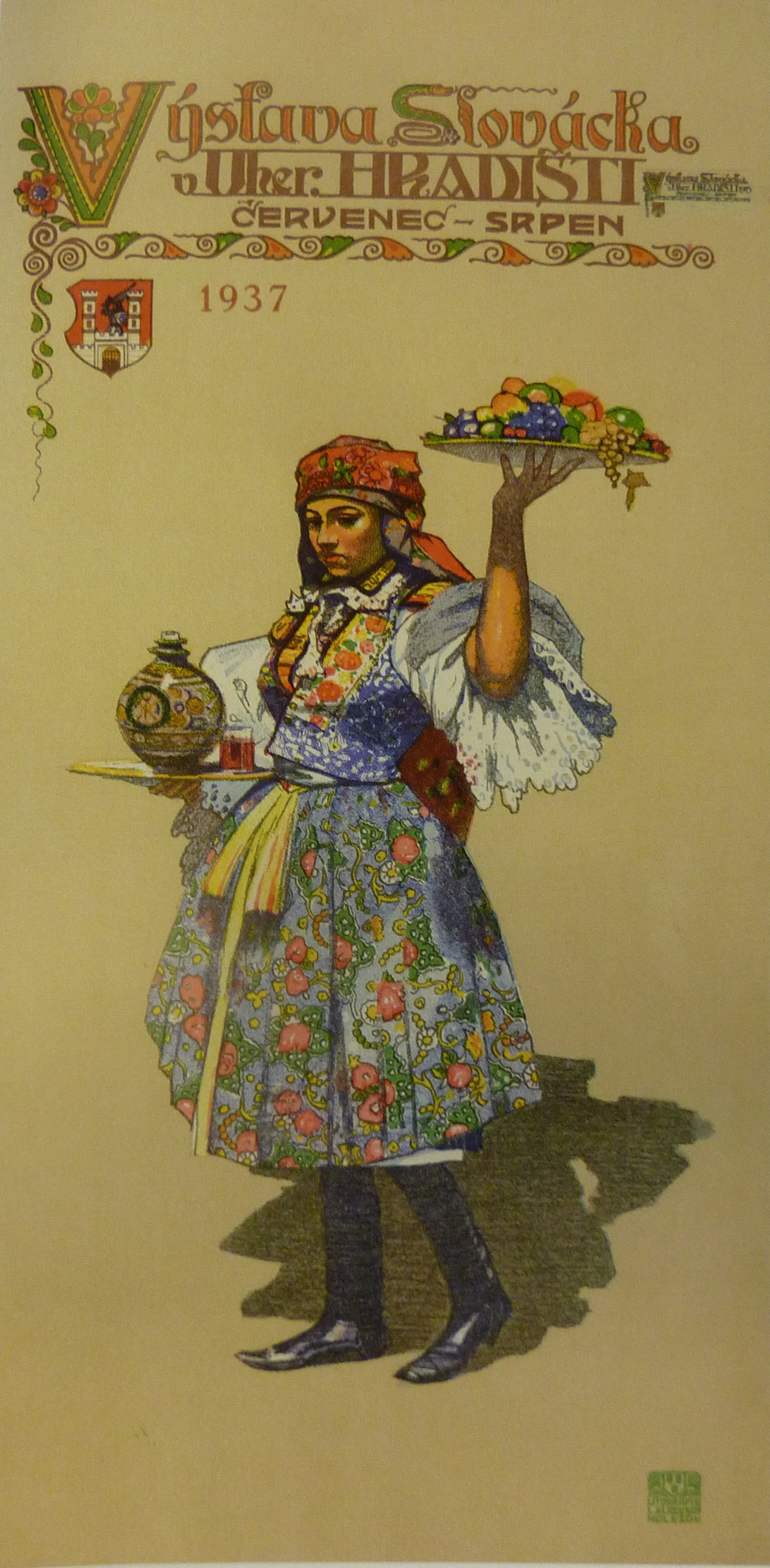 plakát pro výstavu Slovácka v Uherském Hradišti plánovanou na rok 1915, česká varianta